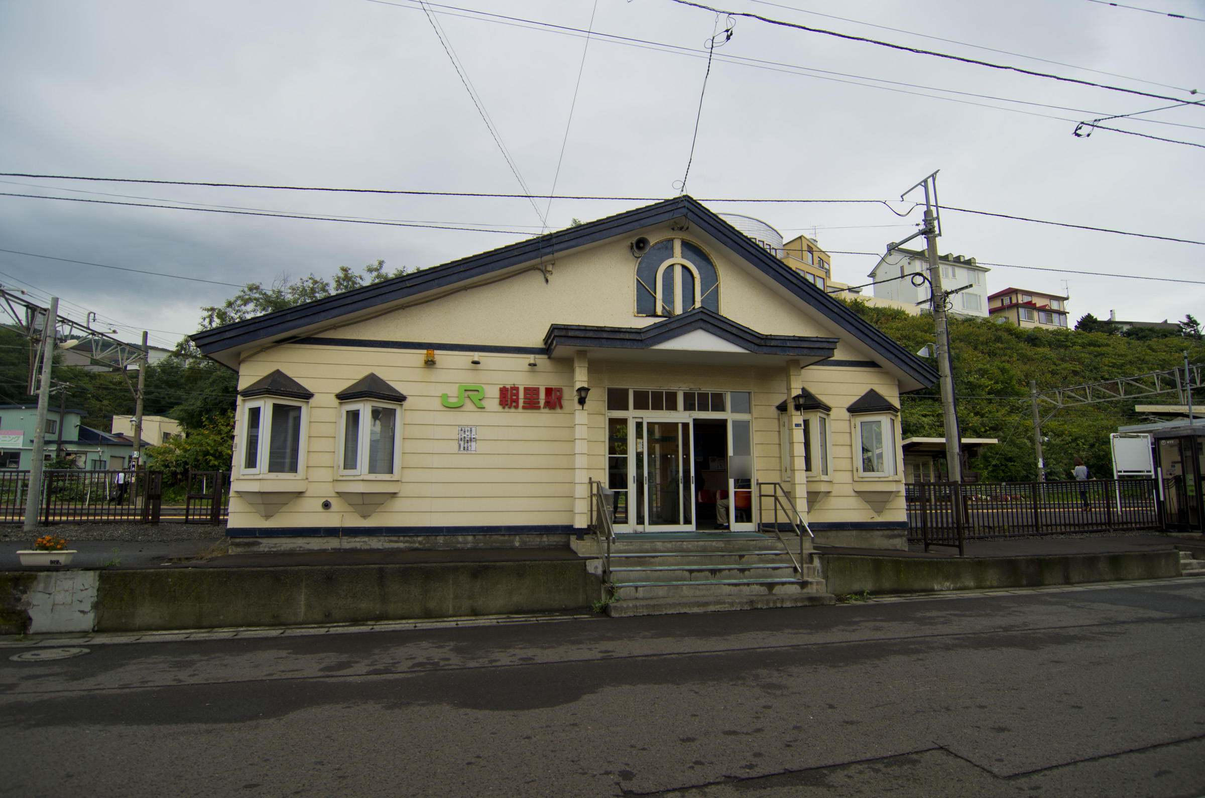 北海道旅客鉄道株式会社函館本線朝里駅駅舎